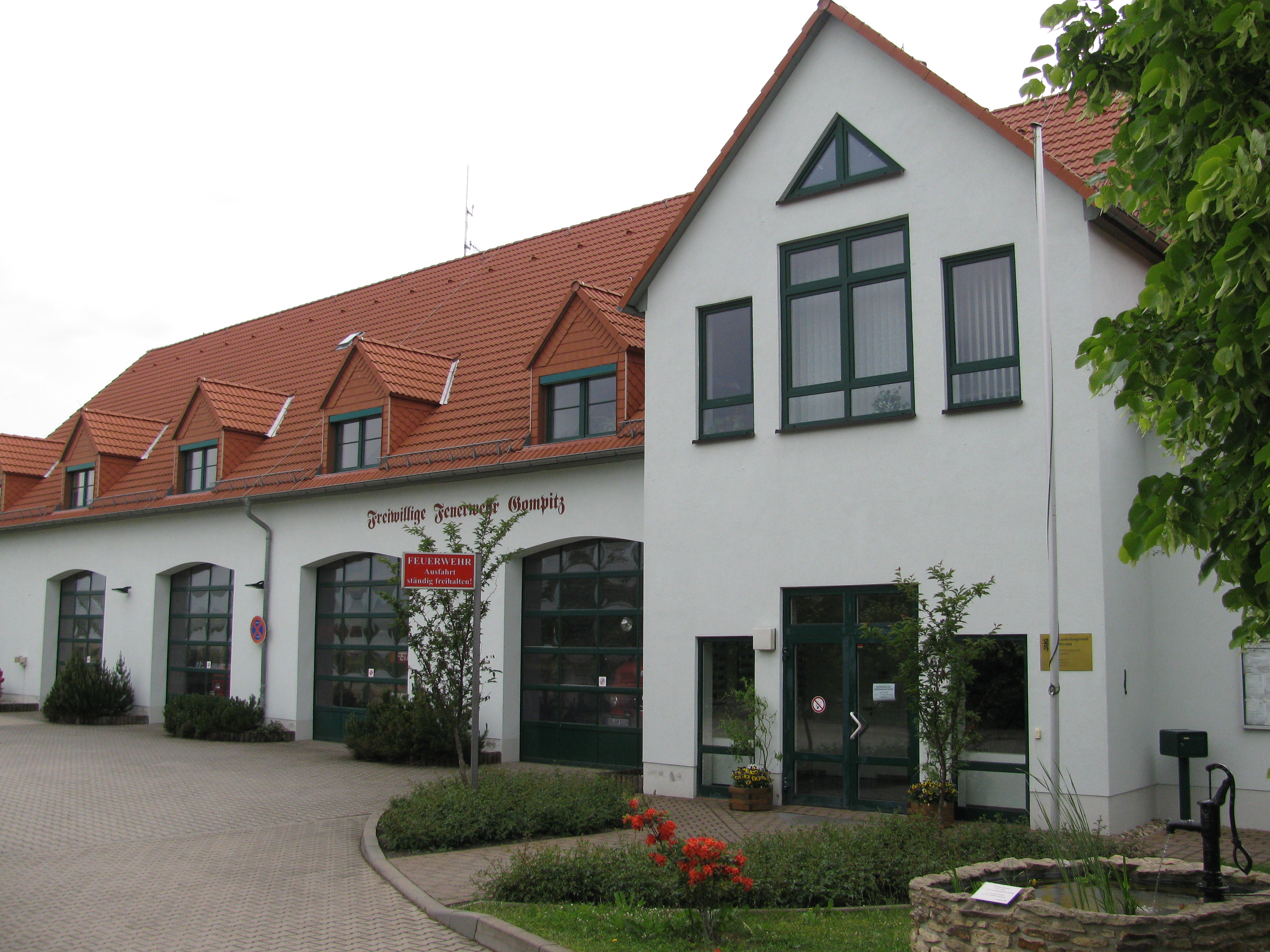 Ortschaftsverwaltung von Gompitz, Mobschatz und Altfranken, im Ortsteil Pennrich gelegen, Landeshauptstadt Dresden